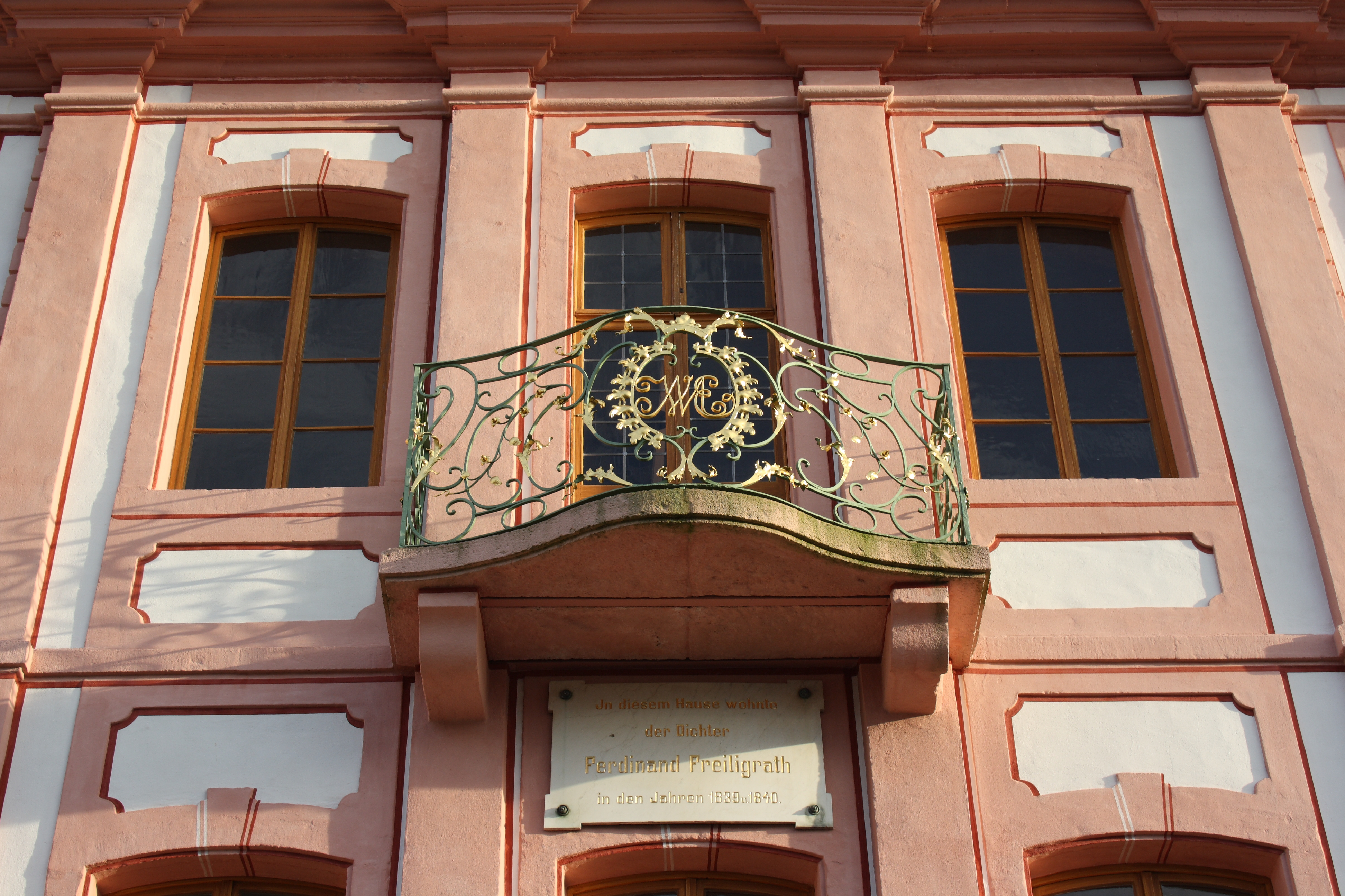 Freiligrathhaus in Unkel